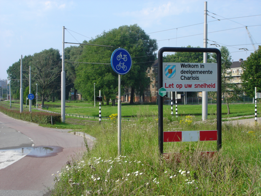 Welcome-sign to the deelgemeente Charlois in Rotterdam